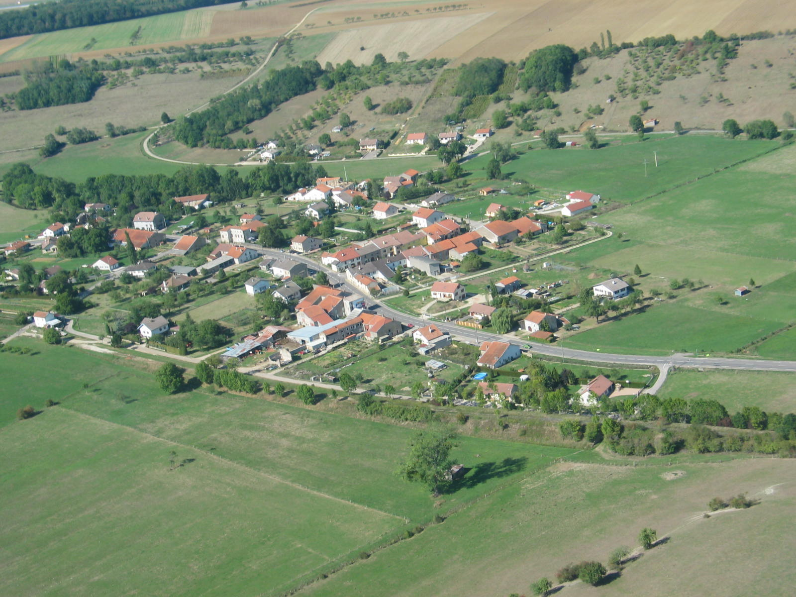 Vue aérienne sur la partie bourg de Ramecourt.